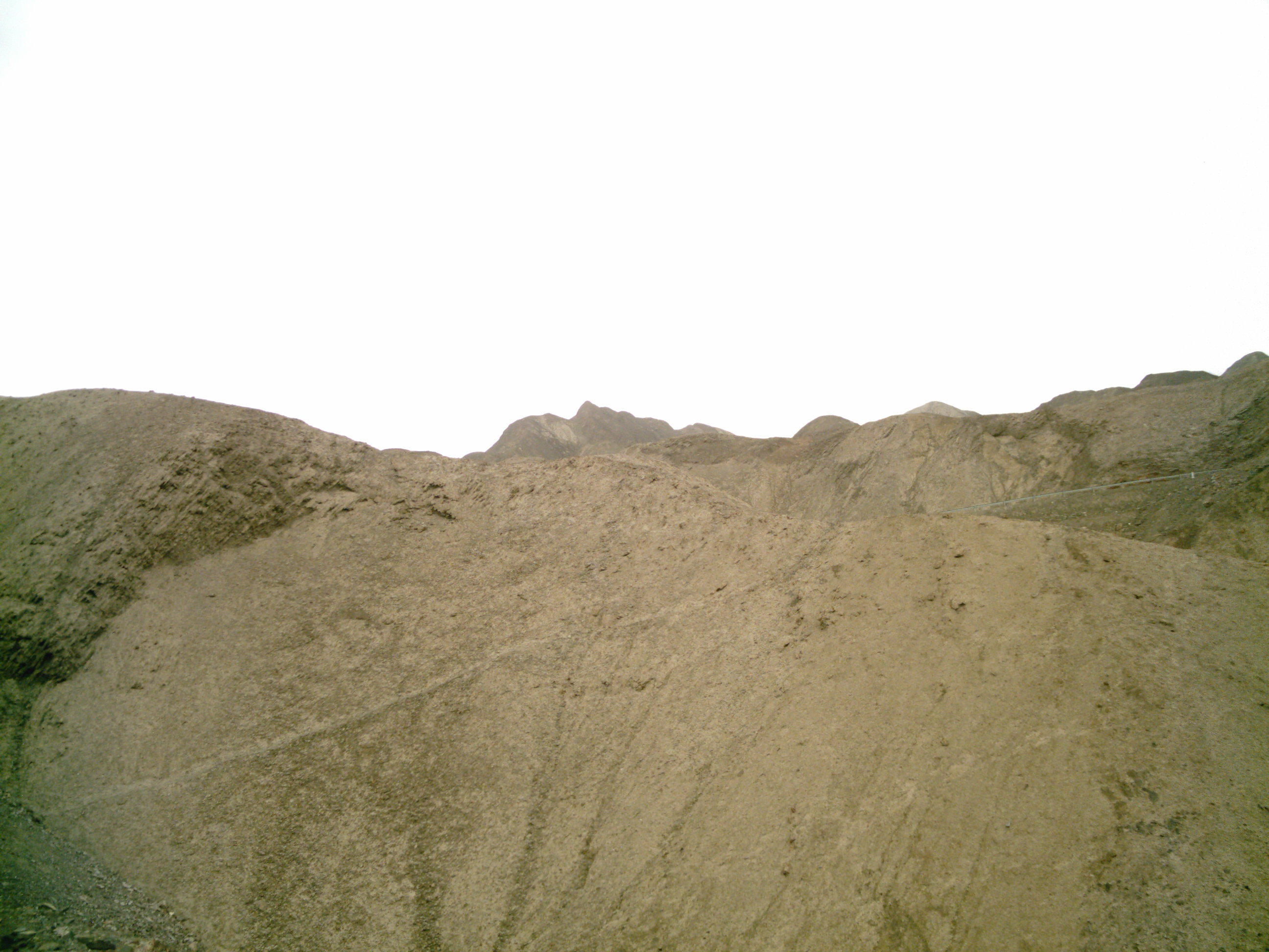 Formación rocosa conocida como "Cara del Inca" (provincia de Palpa)